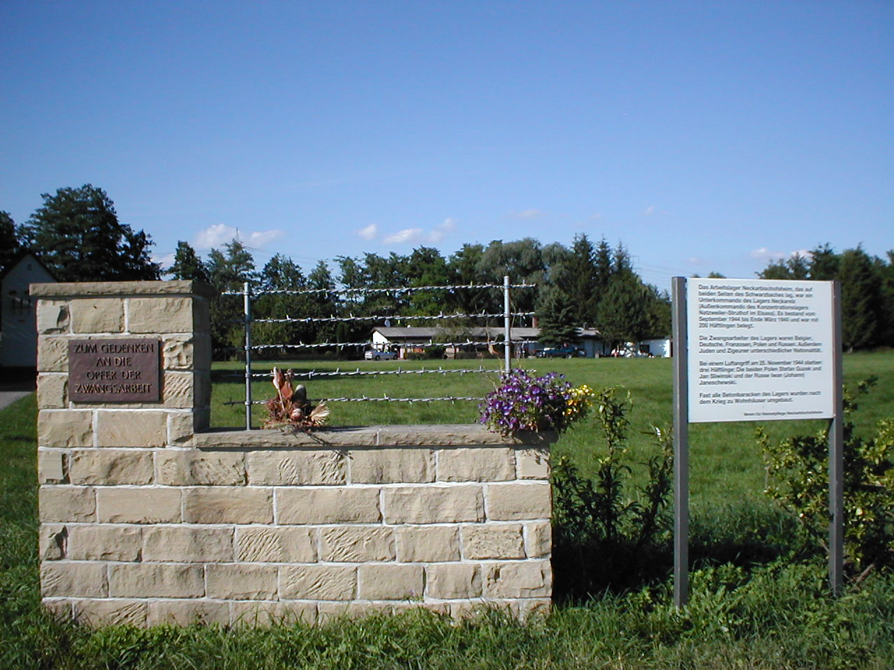 Gedenkstätte Schwarzbachsiedlung in Neckarbischofsheim. Hier befand sich 1944-45 ein Unterkommando des Außenlagers Neckarelz des KZ Natzweiler. Aus den nach dem Krieg zu Wohnzwecken genutzten Baracken hat sich die Schwarzbachsiedlung entwickelt.